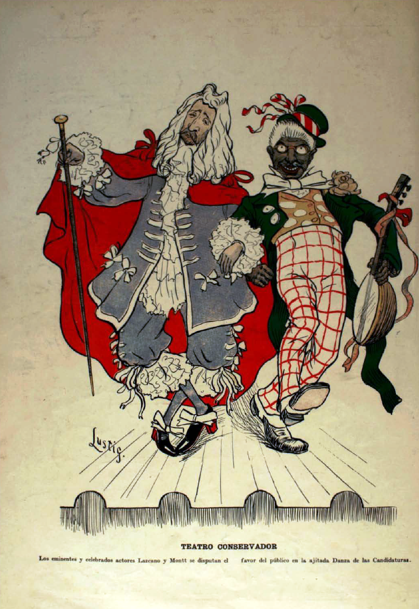 "Teatro Conservador Los eminentes y celebrados actores (Fernando) Lazcano y (Pedro) Montt se disputan el favor del publico en la ajitada (sic) Danza de las Candidaturas"